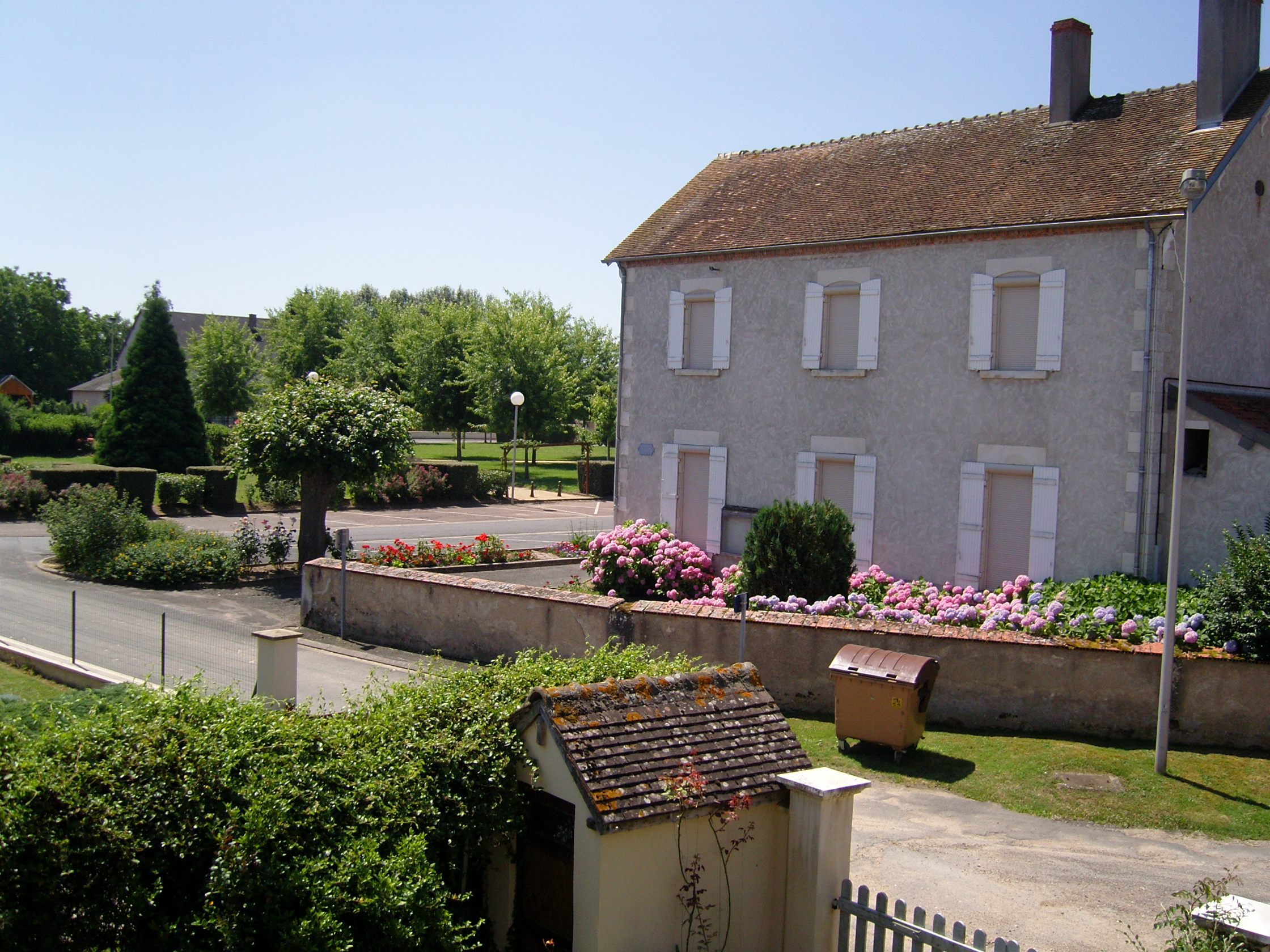 La mairie de Sury-près-Léré